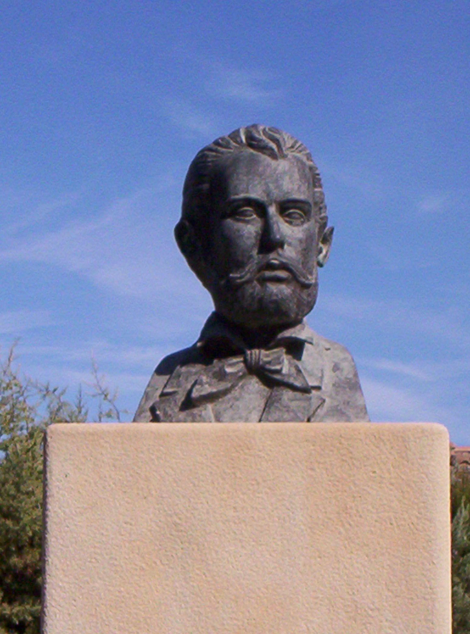 Bust d'Ezequiel Llorach